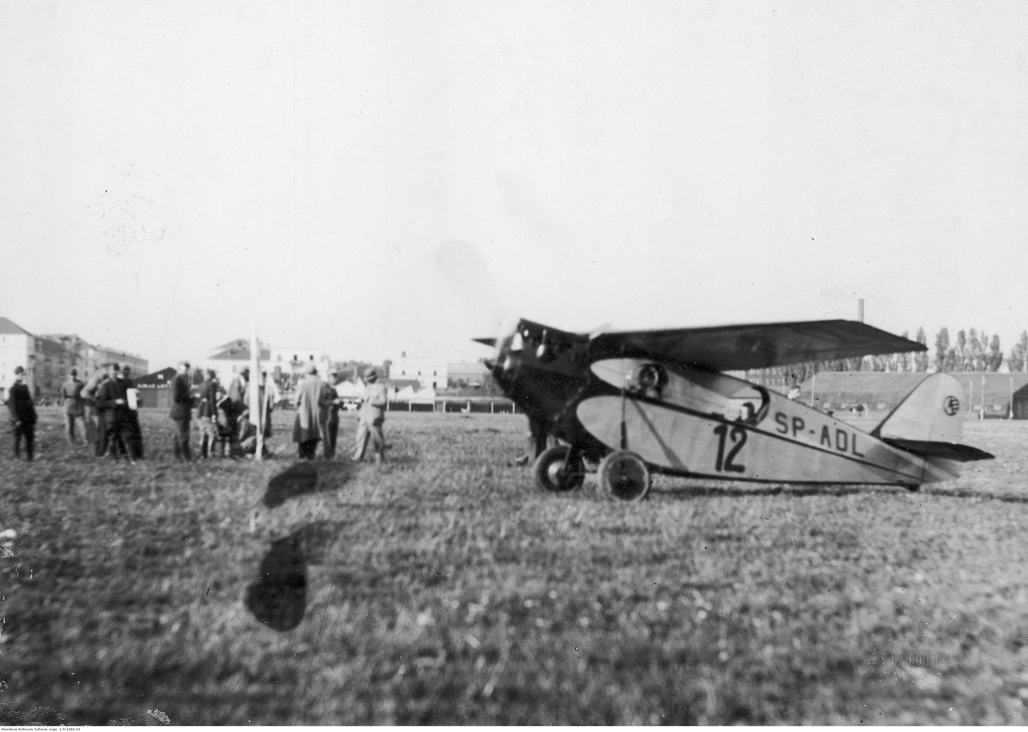 Próba szybkości w obwodzie zamkniętym podczas III Krajowego Konkursu Awionetek w Warszawie. Na starcie samolot RWD-4 SP-ADL pilotowany przez Franciszka Żwirkę.